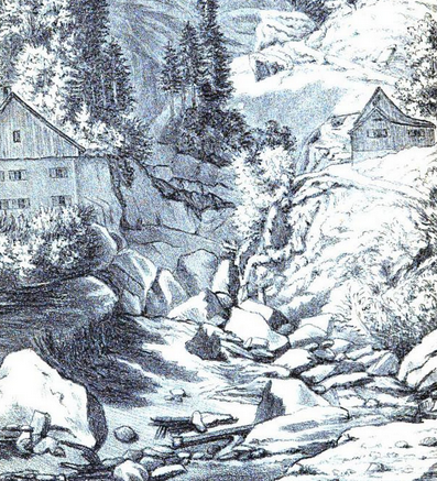 der Steigbachtobel nach der Überschwemmung von 1873, Detail